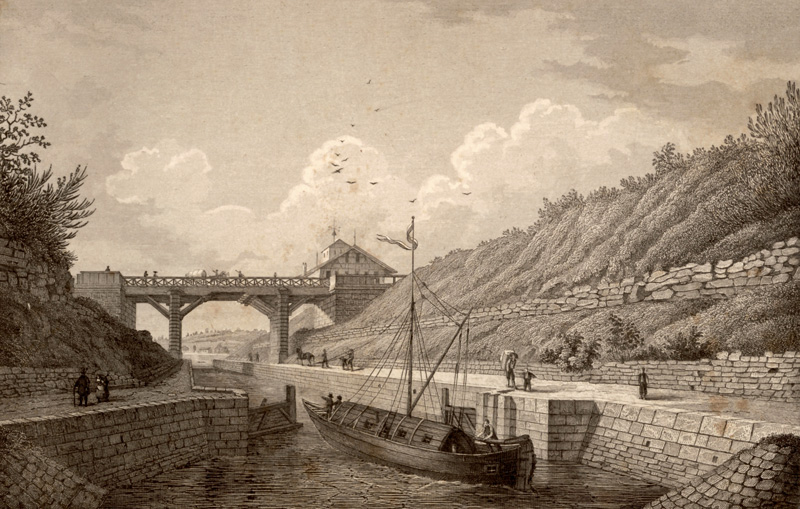 Der Dörlbacher Einschnitt mit der neuen Brücke, u. der sogenannten Kaserne. Stahlstich von Alexander Marx aus dem Buch Pittoreske Ansichten des Ludwig-Donau-Main-Kanals. Gezeichnet, auf Stahl gestochen und herausgegeben von Alexander Marx. 1845. Kupferstecher in Nürnberg. Das Bild zeigt den Dörlbacher Einschnitt in der Gemeinde Burgthann.